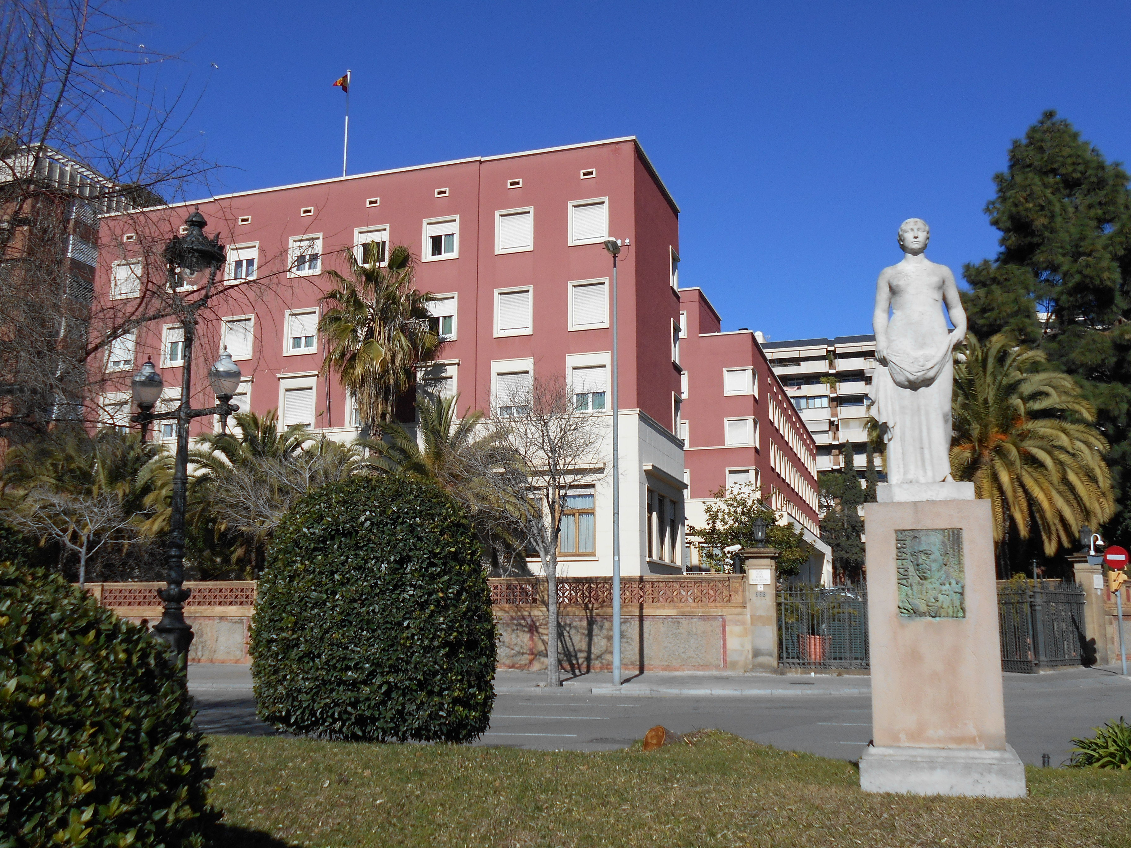 Residencia de Oficiales (1939-1940), de Manuel de Solà-Morales i de Rosselló, avenida Diagonal.